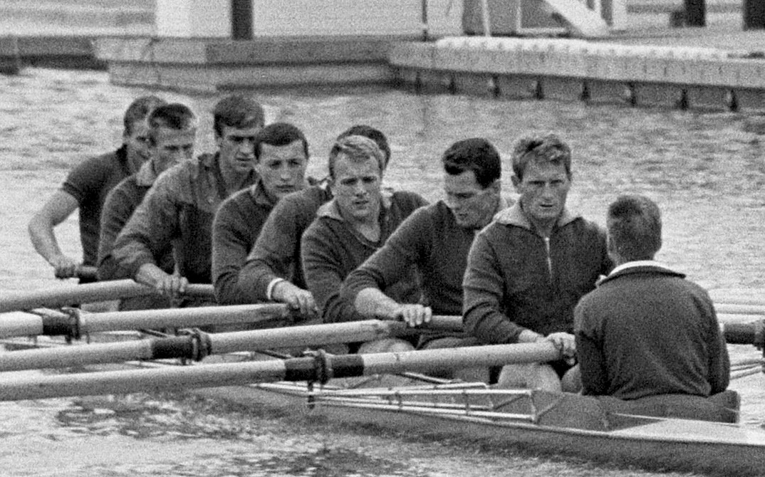 Europese roeikampioenschappen training, de Russische acht in actie